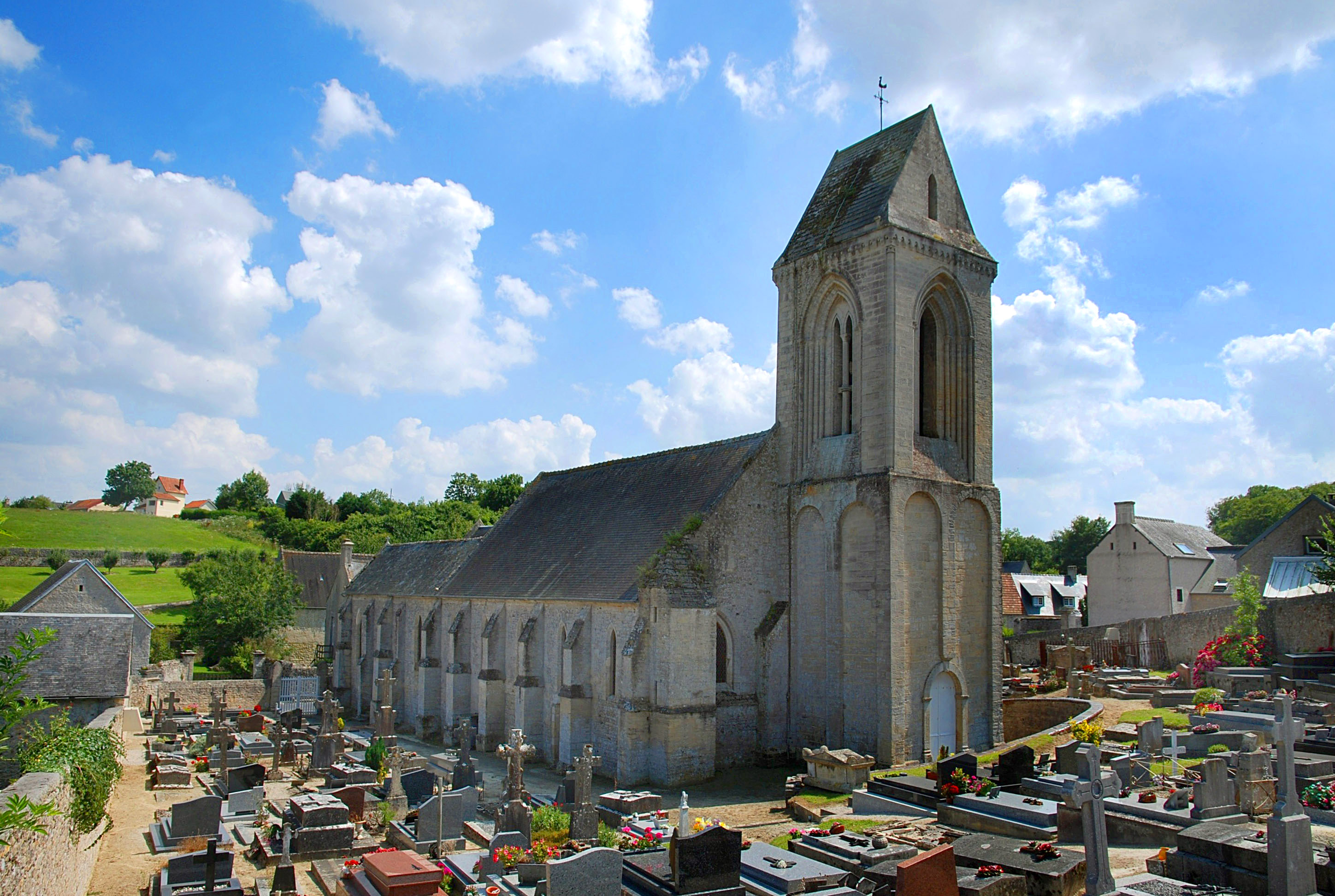 Sainte-Honorine-des-Pertes (Calvados)